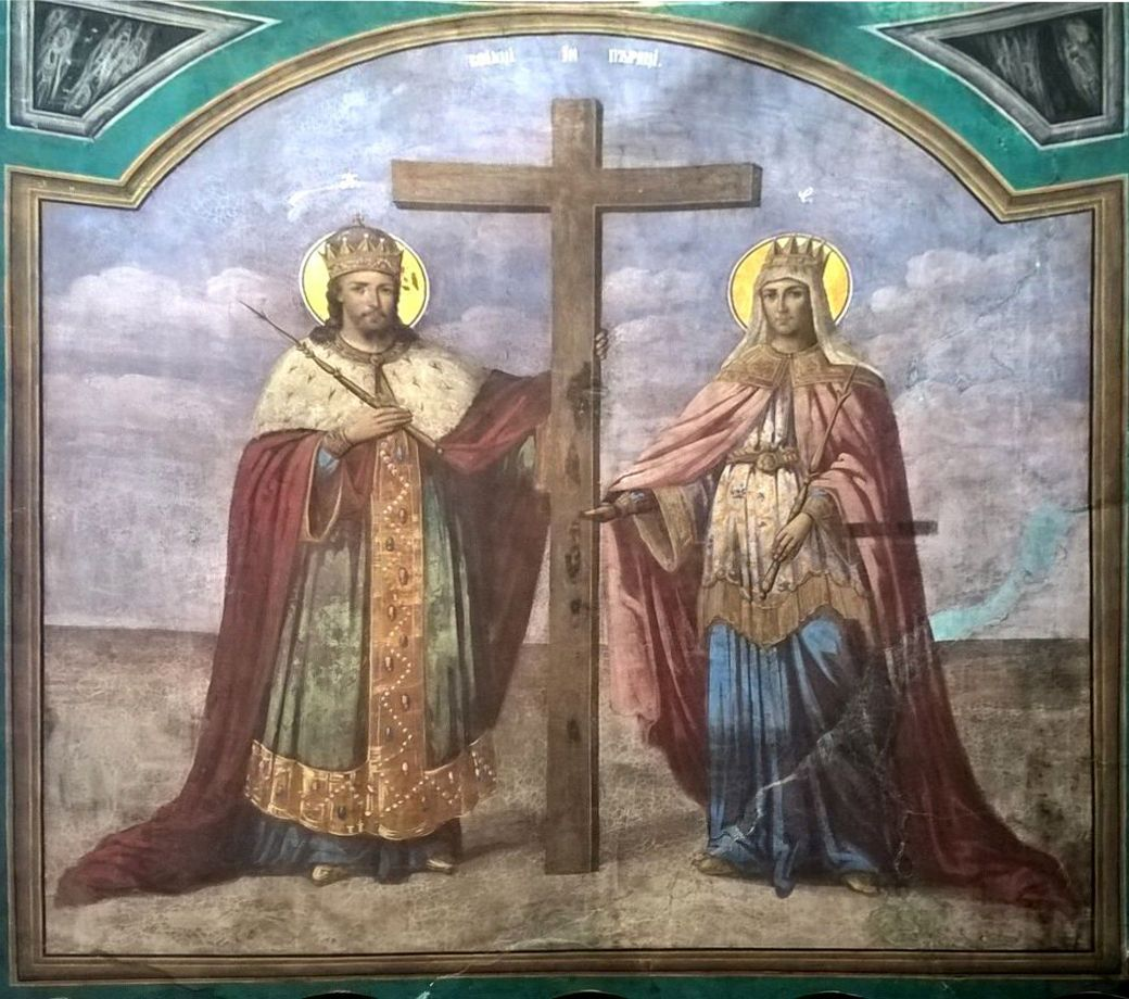 Sfinții Constantin și Elena - de Nicolae Grigorescu la Mănăstirea Zamfira